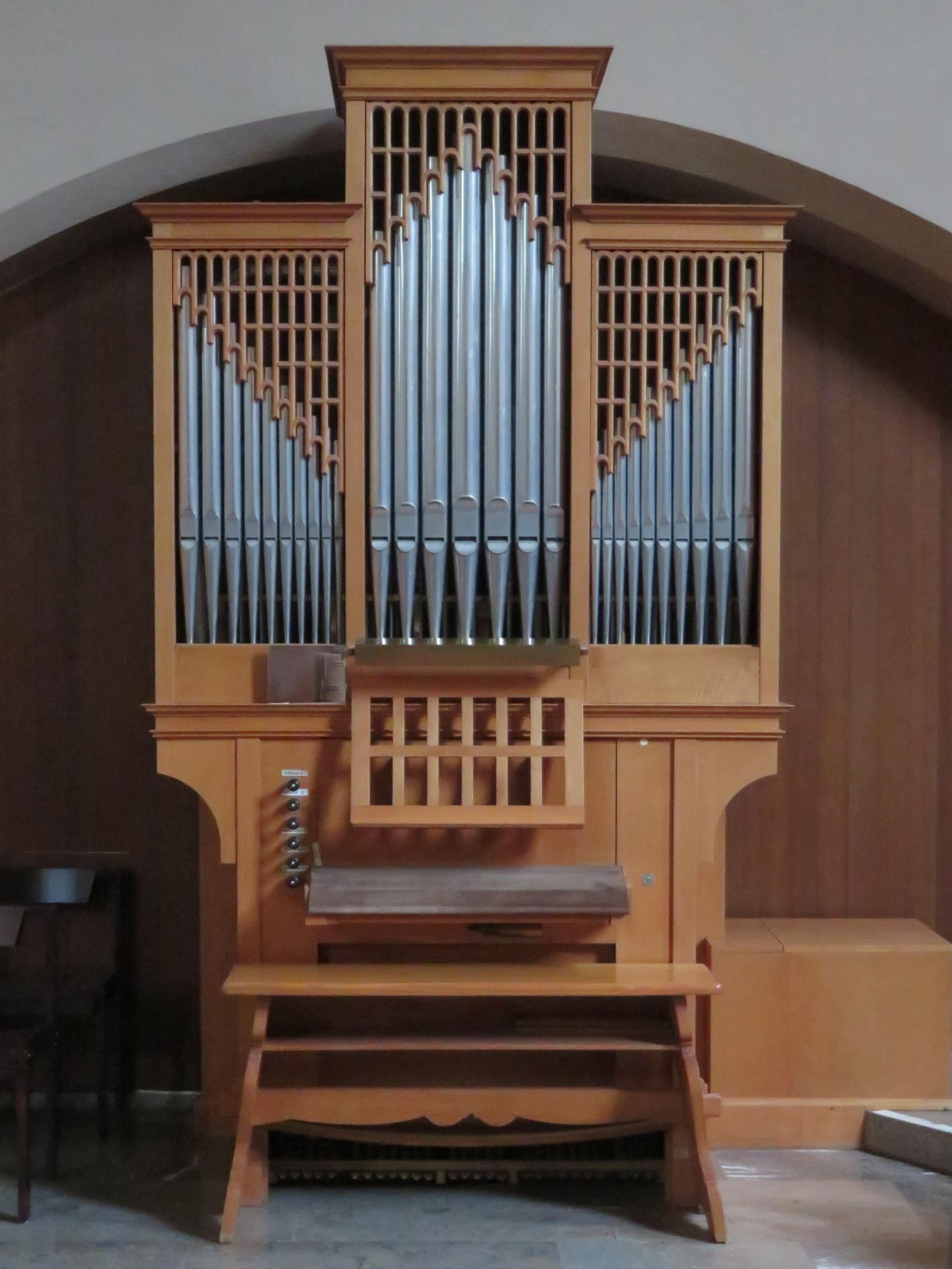 Chororgel von Mathis-Orgelbau in der Pfarrkirche St. Laurentius in Schaan, Liechtenstein.